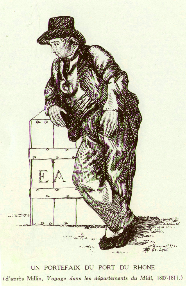 Portefaix du Rhône par Millin Voyage dans les départements du Midi 1807 1811